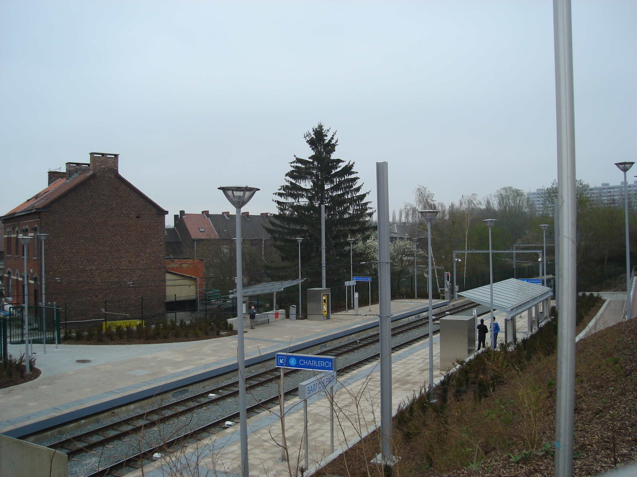 Station Sart-Culpart sur l'antenne de Soleilmont.